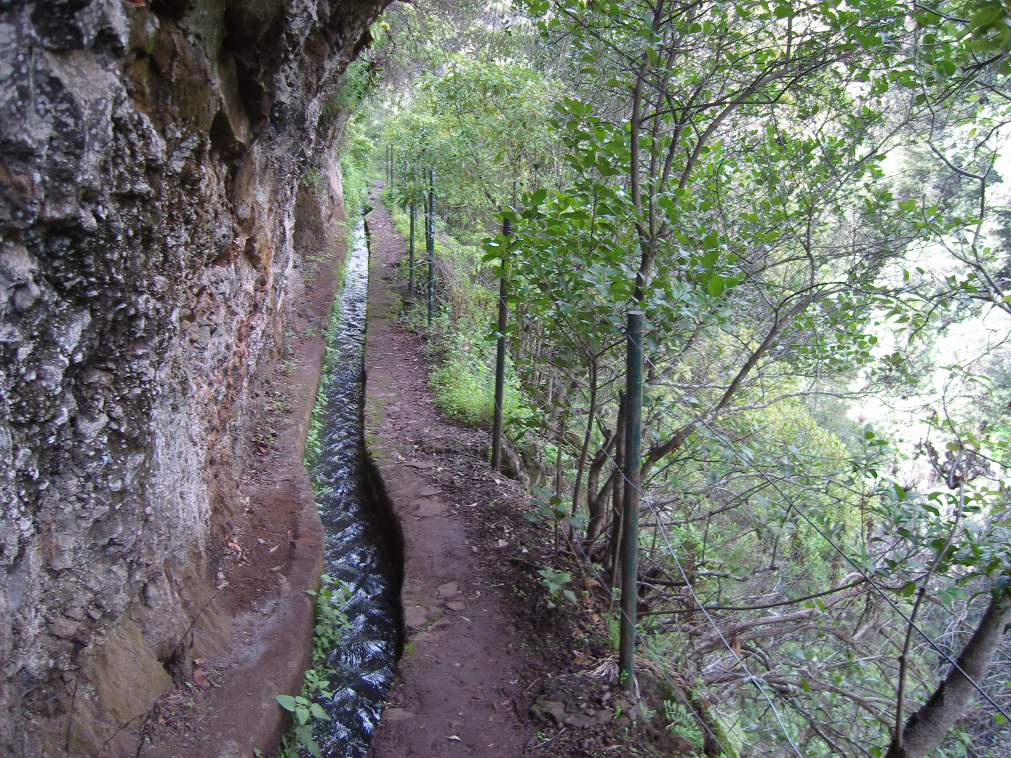 Teil der Levada do Bom Sucesso auf Madeira